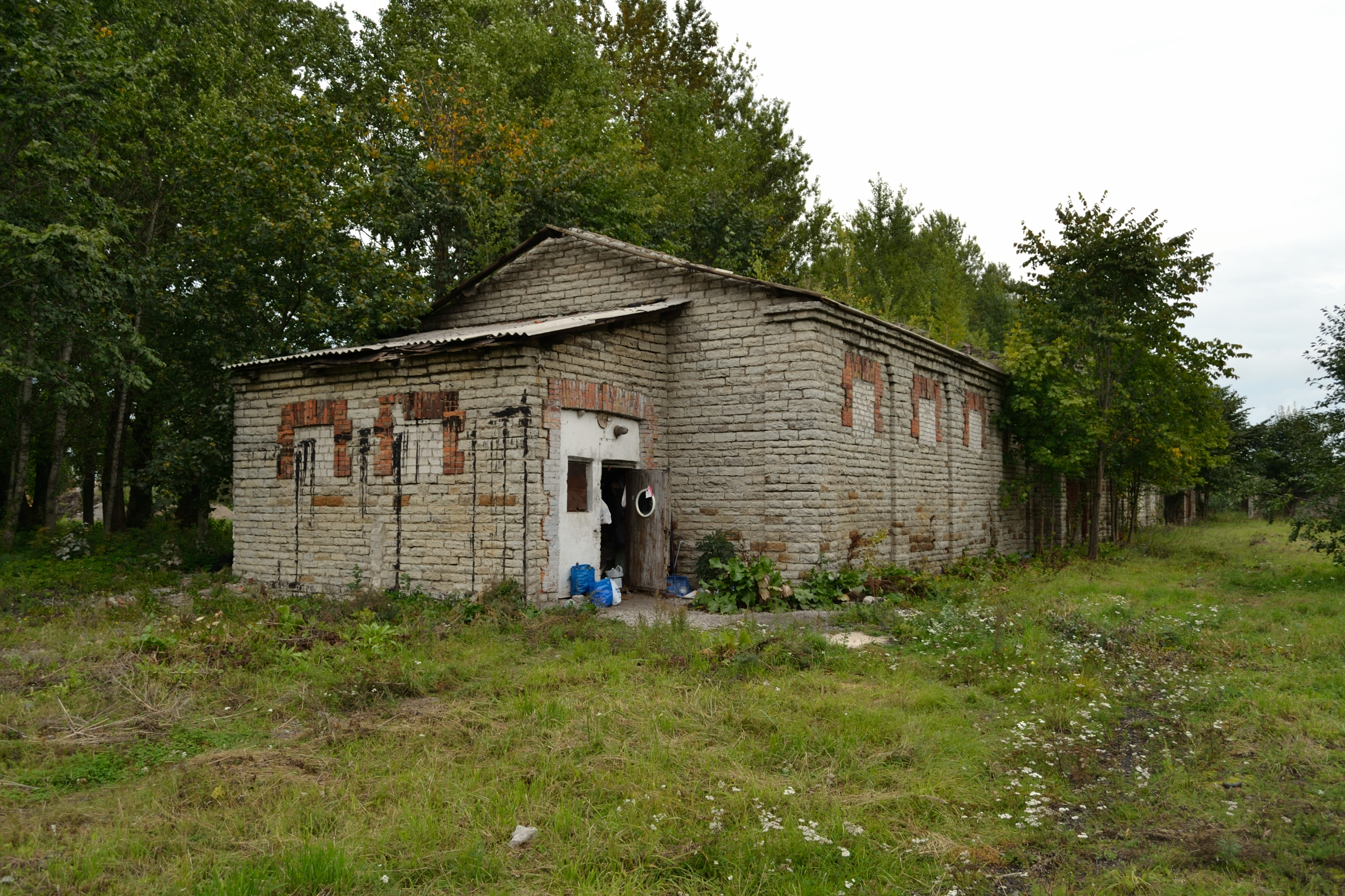 Tondi sõjaväelinnaku tallihoone Tondi 53B-Seebi 24A, 1915-1916